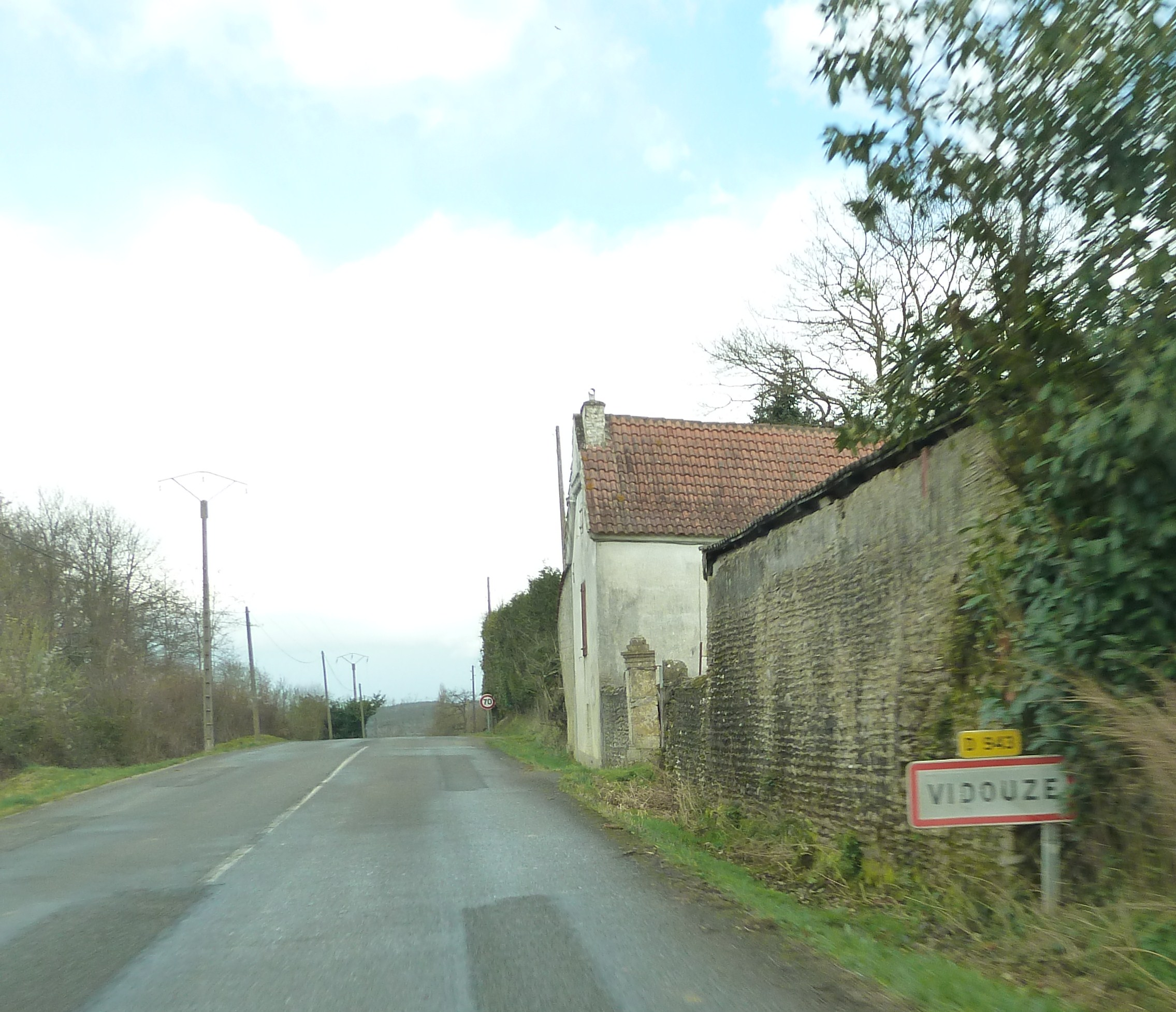 Vidouze